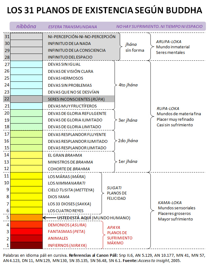 Los 31 planos de existencia segun Buddha.